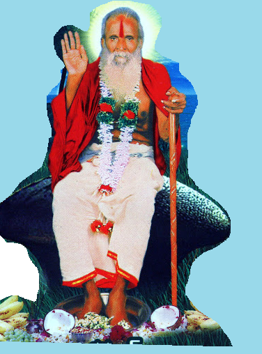 కాశిరెడ్డి నాయన